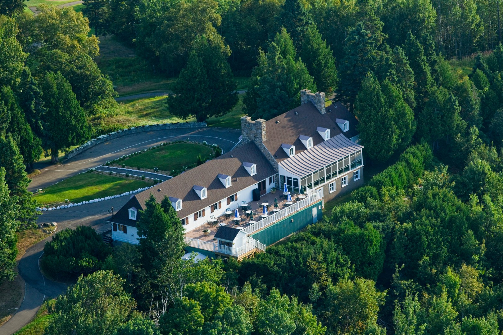 Le Vieux Club House du Fairmont le Manoir Richelieu est le lieu où sont situés les observatoires de l'Astroblème et astronomique de Charlevoix.